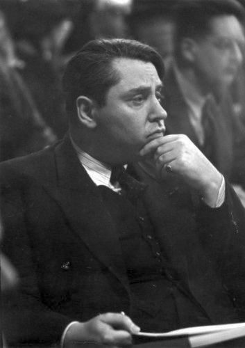 J. Goudstikker, Amsterdams kunsthandelaar, op de schilderijenveiling van wijlen de heer Mensing. Amsterdam, november 1938. November 1938